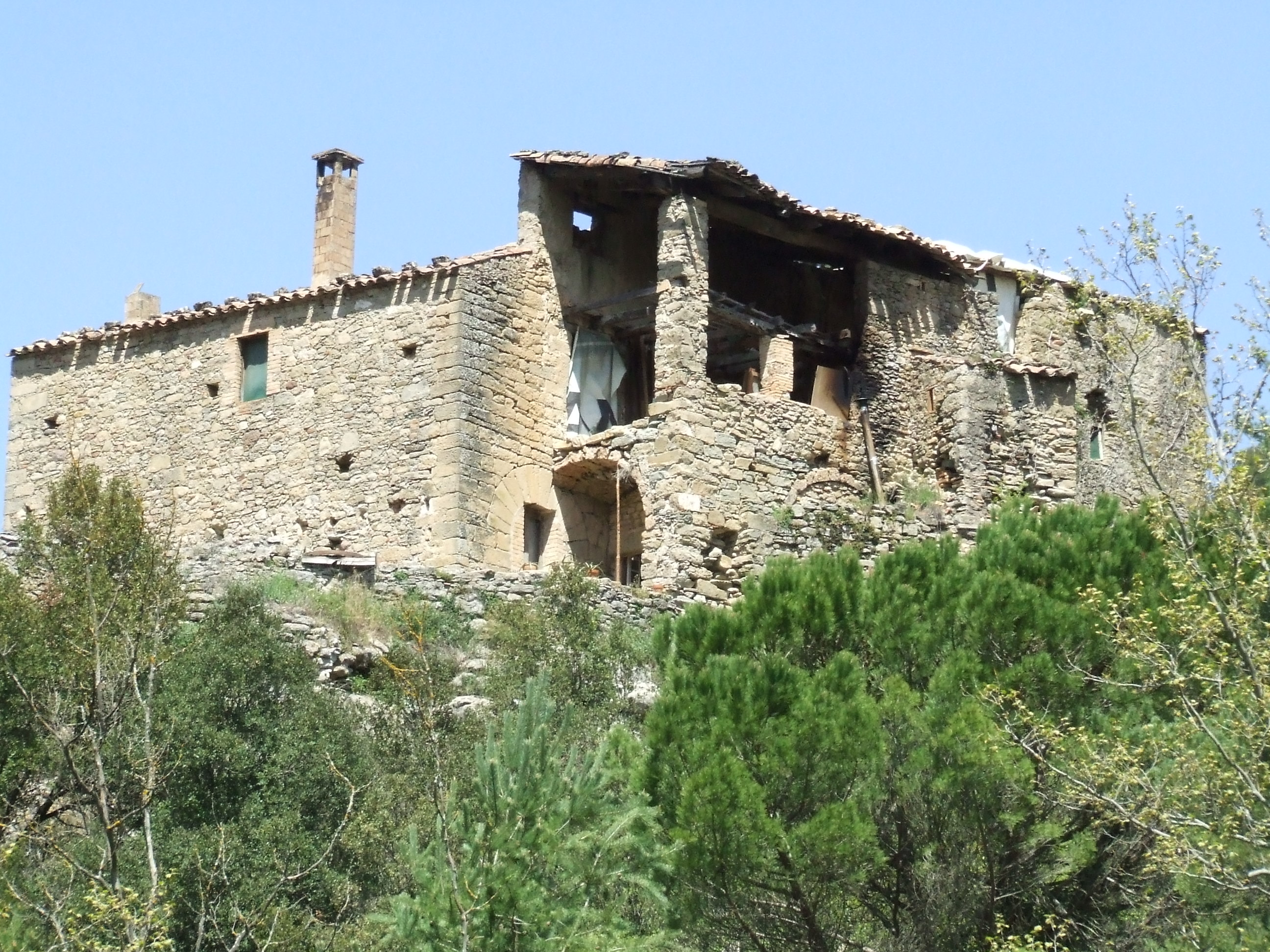 La masia dels Sorts des del sud-est (Marfà, Castellcir, Moianès)